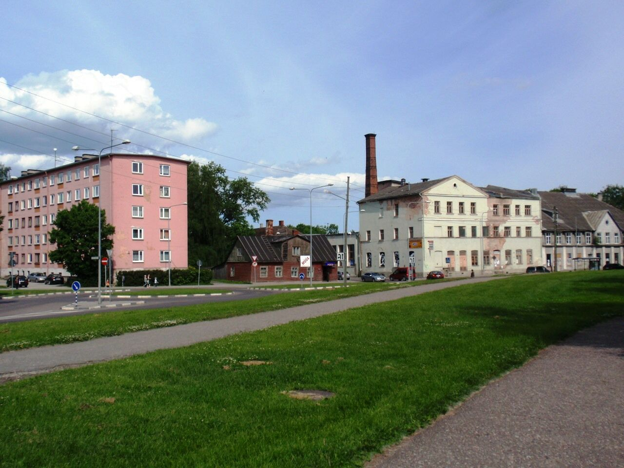 Pikk tänav tartus Pärmivabriku juures.